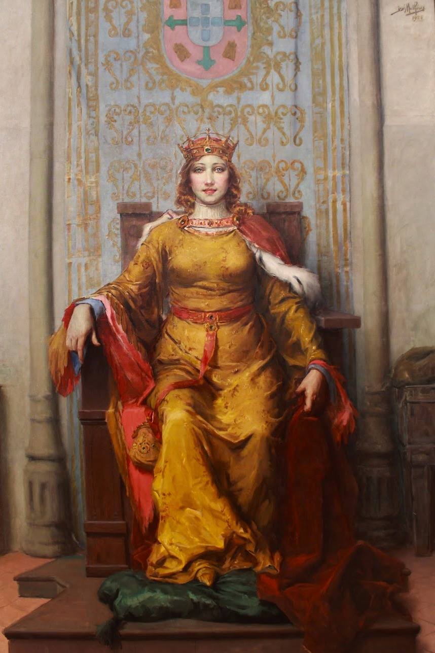 a rainha